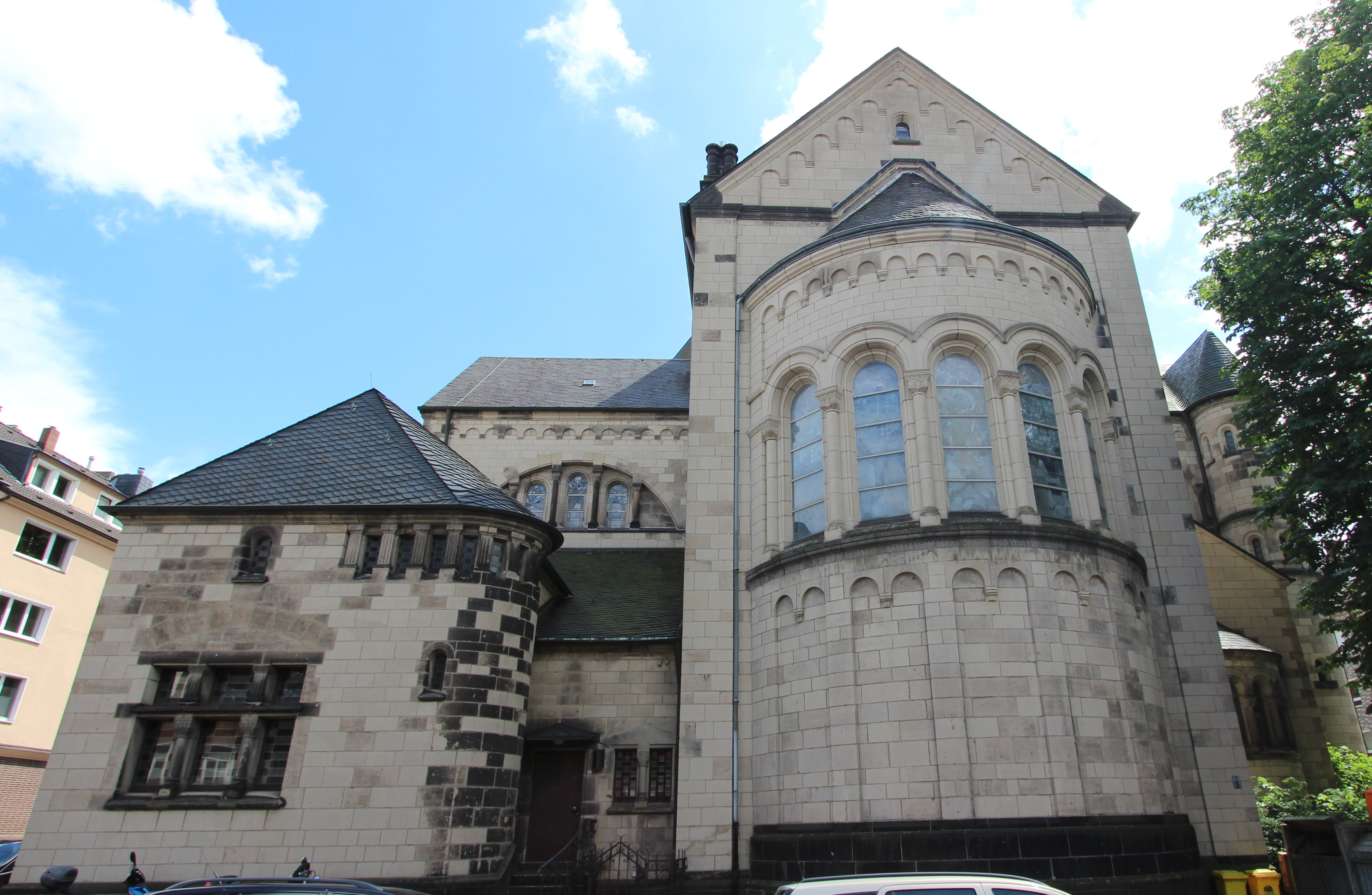 "Rather Dom" in 40472 Düsseldorf-Rath. Katholische Kirche St. Josef. Aufnahme aus Nord-Westen von 2016.